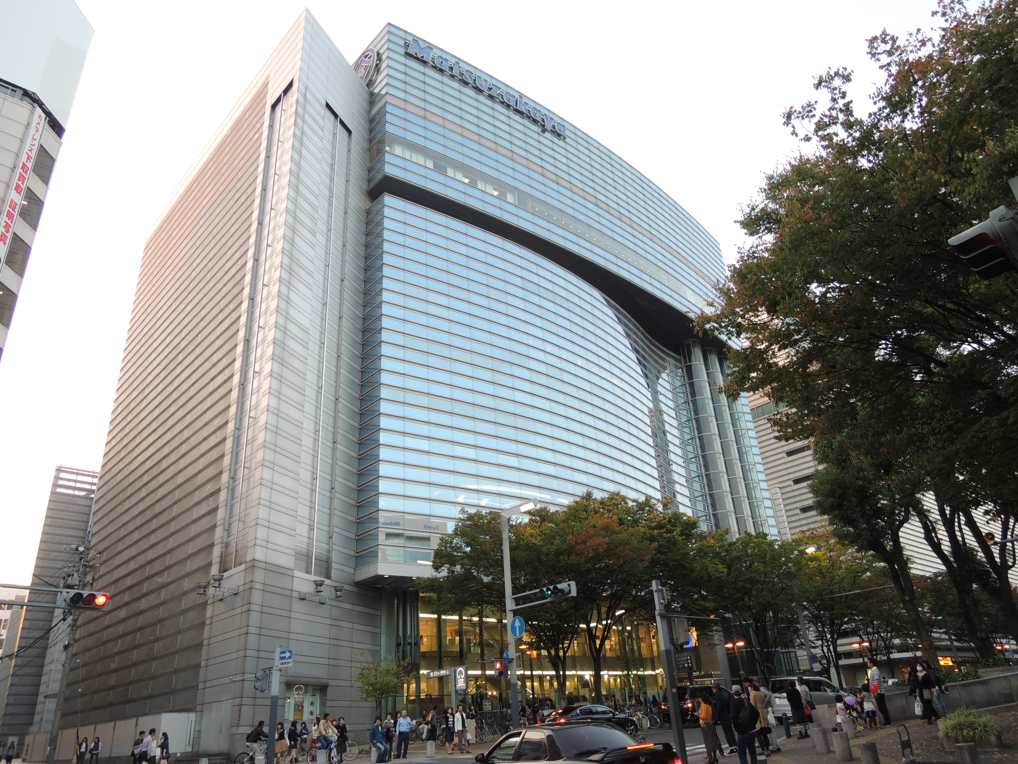 松坂屋名古屋店 南館 外観